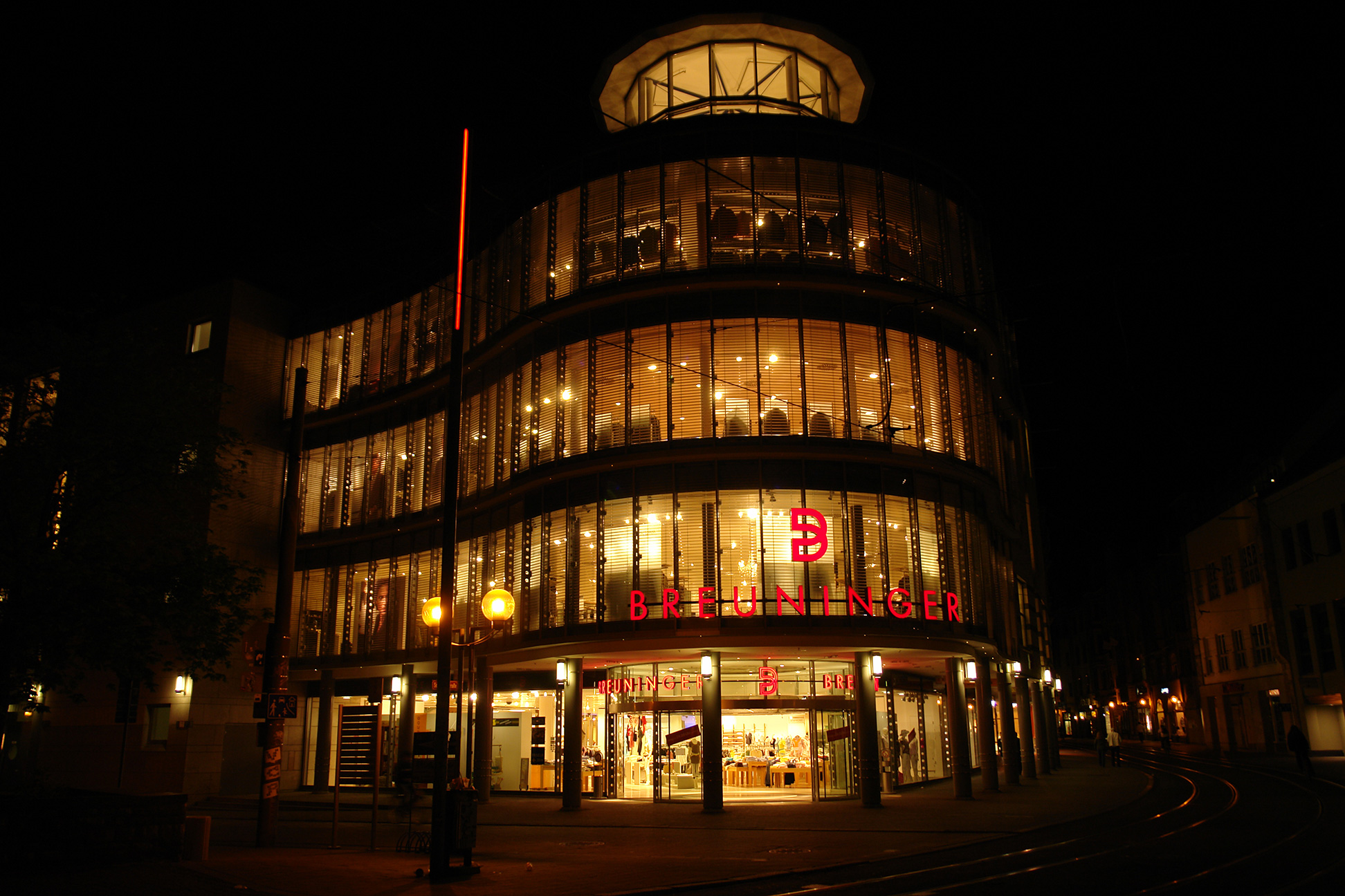 Erfurt, Thuringia, Germany Breuninger Warenhaus